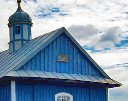 Вавулічы. Свята-Раства-Багародзіцкая царква